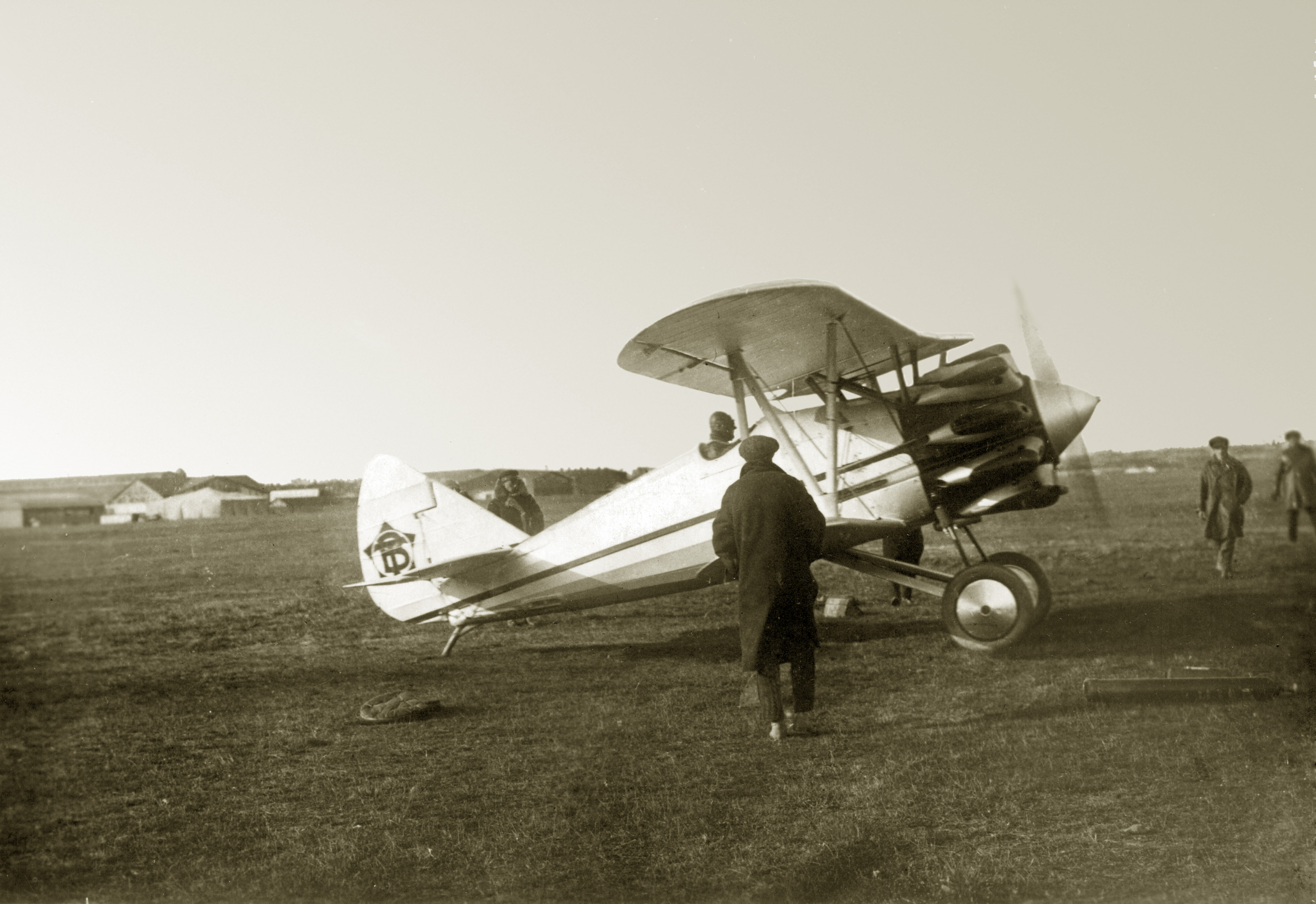 После приземления ВТ-11. Летчик Б.Л. Бухгольц еще в кабине. 28 апреля 1930 г. The VT-11 was the first prototype of the Polikarpov I-5